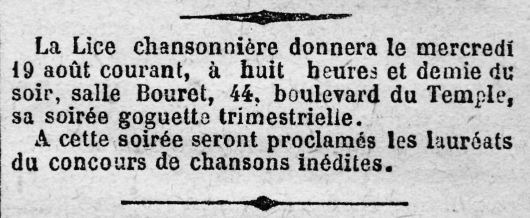 Annonce de la goguette trimestrielle de la Lice chansonnière. page 4, 6ème colonne